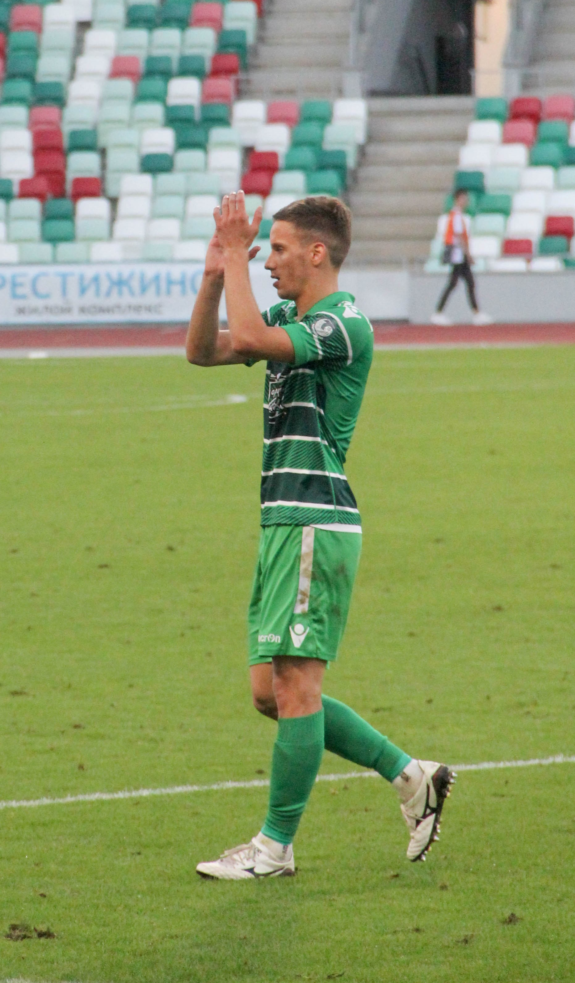 Боян Дубайич в форме ФК "Городея. 19.08.2018